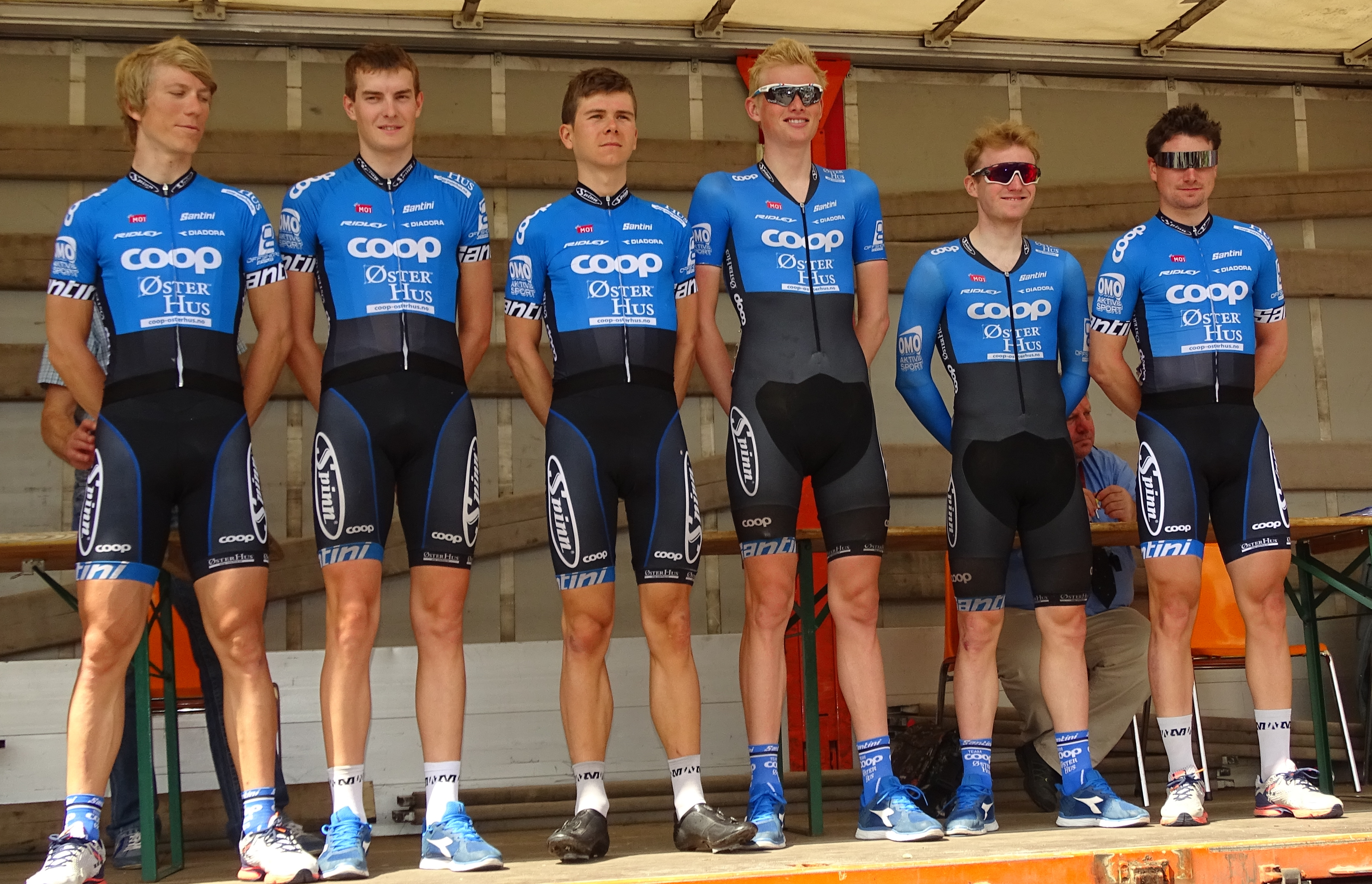 Reportage réalisé le dimanche 7 juin à l'occasion du départ du Mémorial Philippe Van Coningsloo 2015 à Wavre, Belgique.